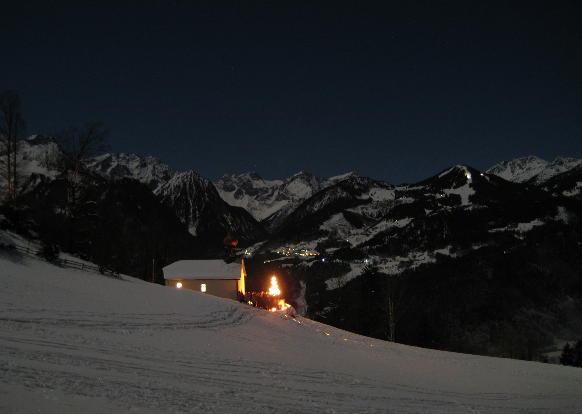 Weihnachtsmette in der Nacht vom 24. auf den 25. Dezember 2007 in der Bergparzelle Laz in Nüziders / Österreich. Im Hintergrund die Gebirgskette des Rätikons mit der Gemeinde Bürserberg